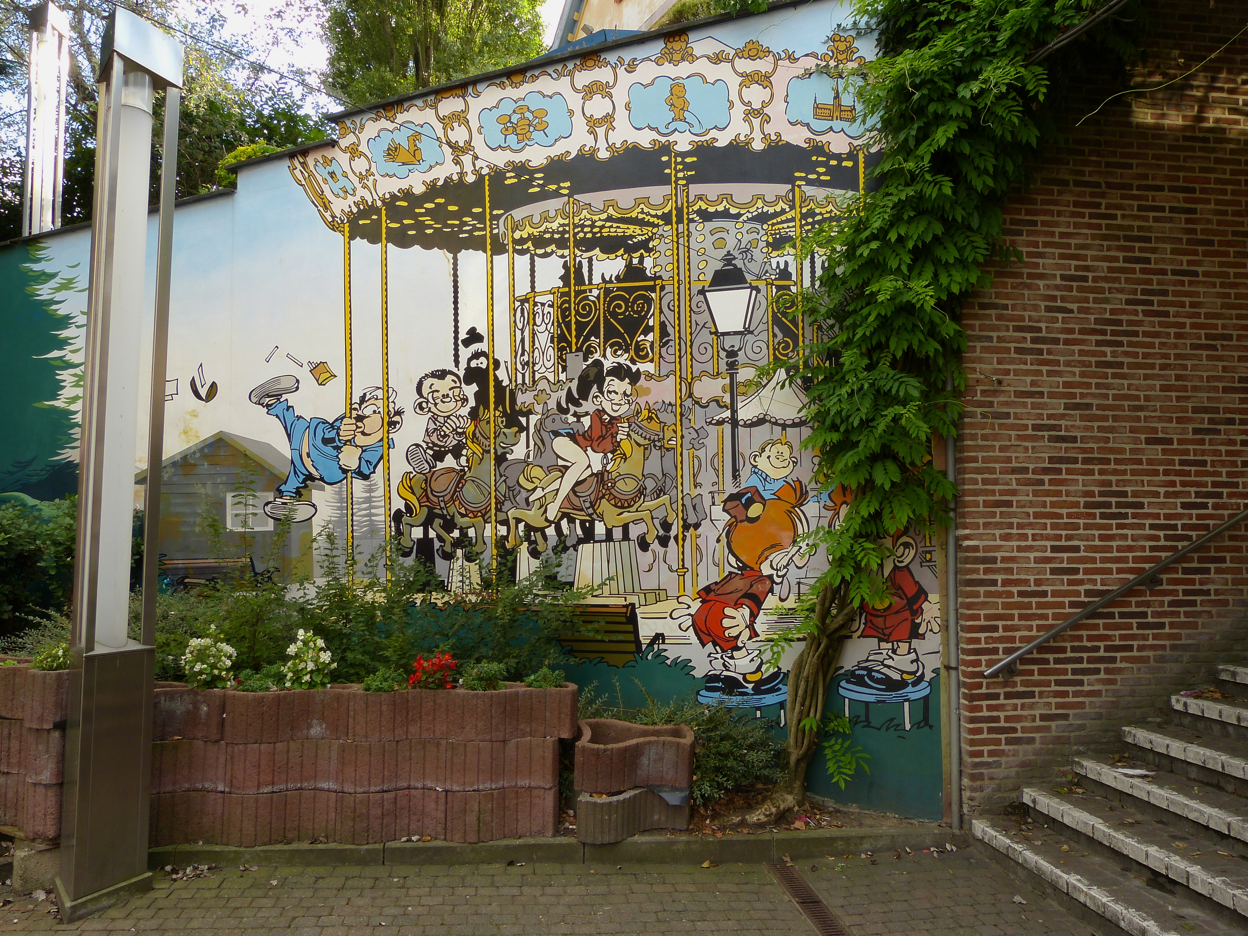 Le Petit Spirou (dt.: Der kleine Spirou). Comicwand in Brüssel, Boulevard du Centenaire (Place de Bruparck), Laeken